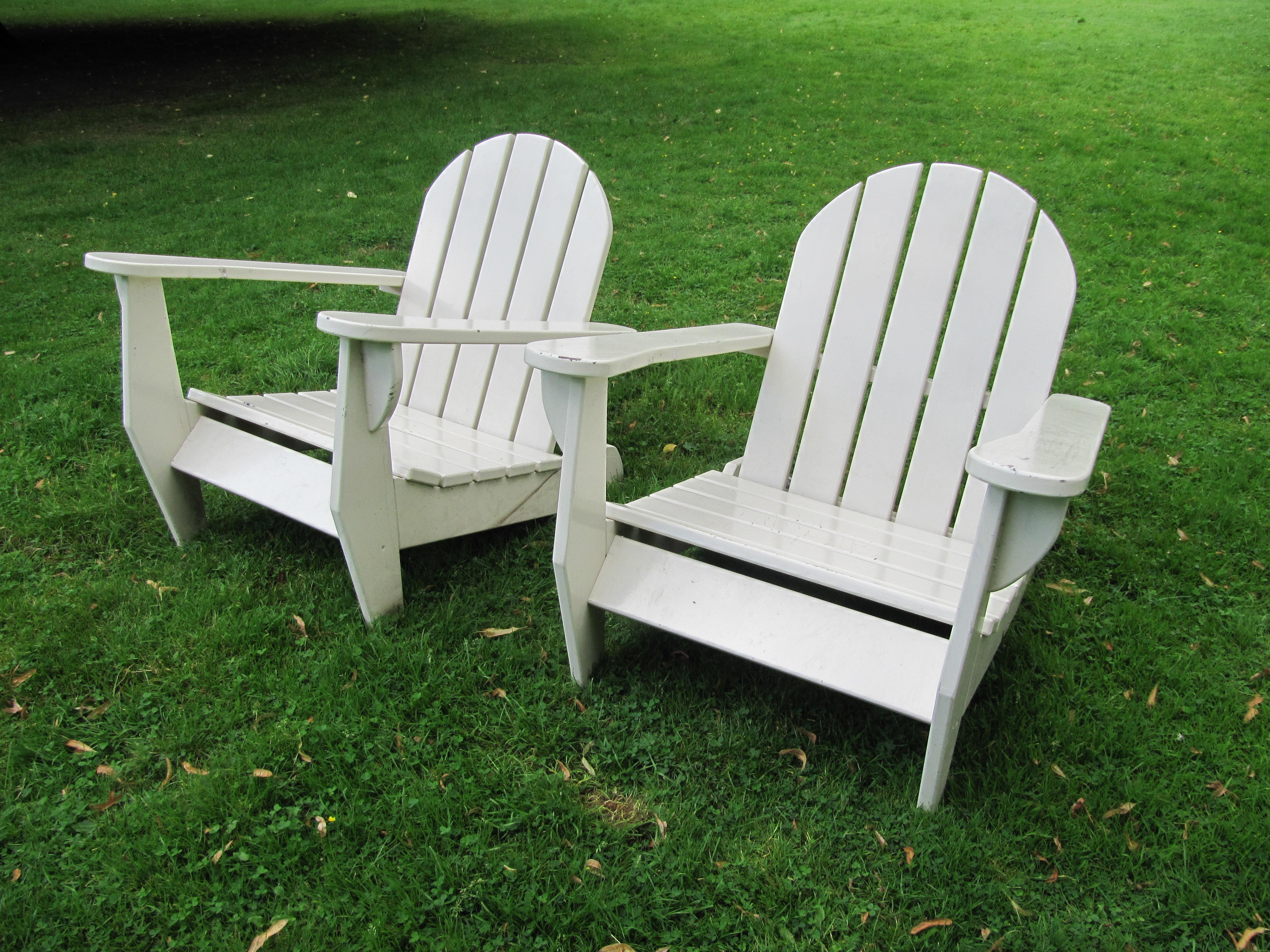 Stühle Blohms Park 1